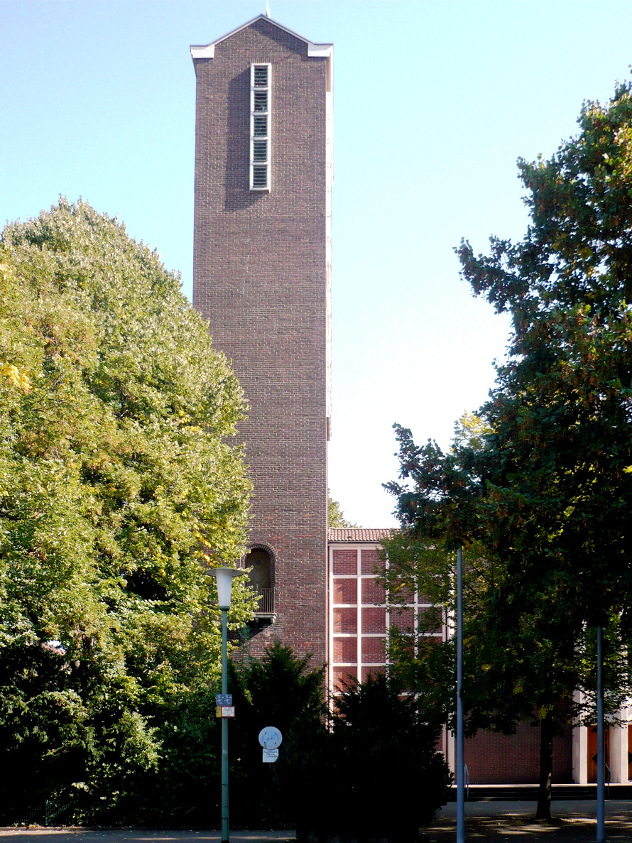 Katholische Herz-Hesu-Kirche in Essen-Frintrop